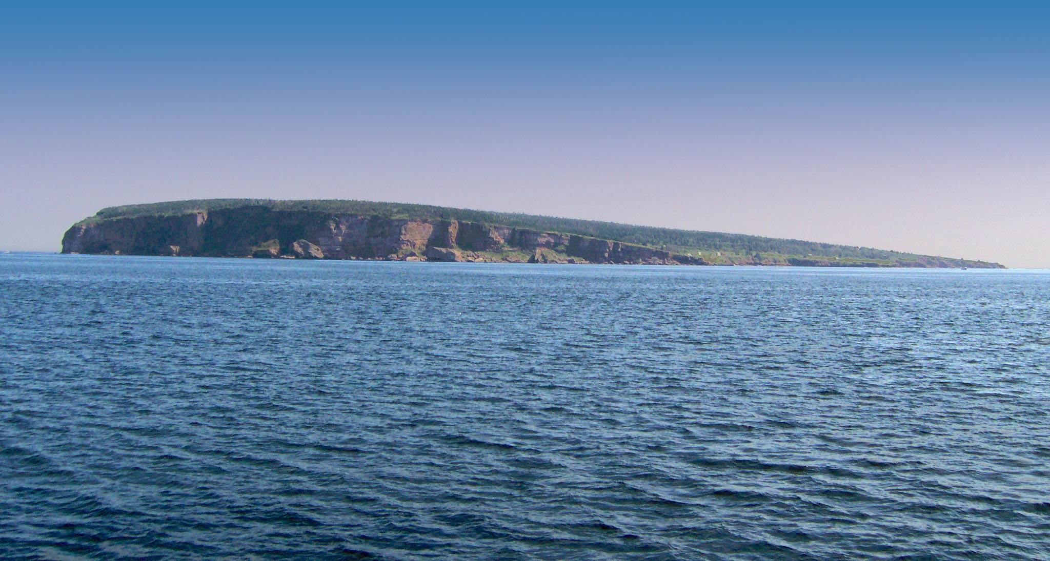 Ile Bonaventure